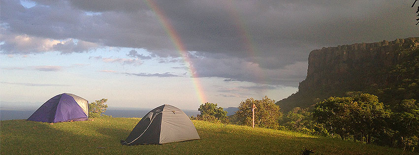 Vista desde el mirador de Santiago de Chiquitos al Valle de Tucabaca